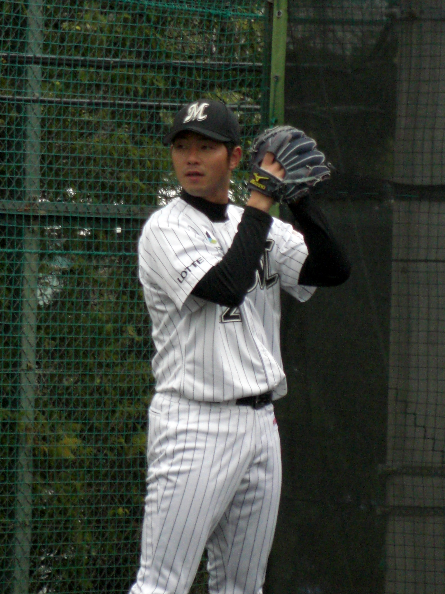 ロッテ浦和球場にて